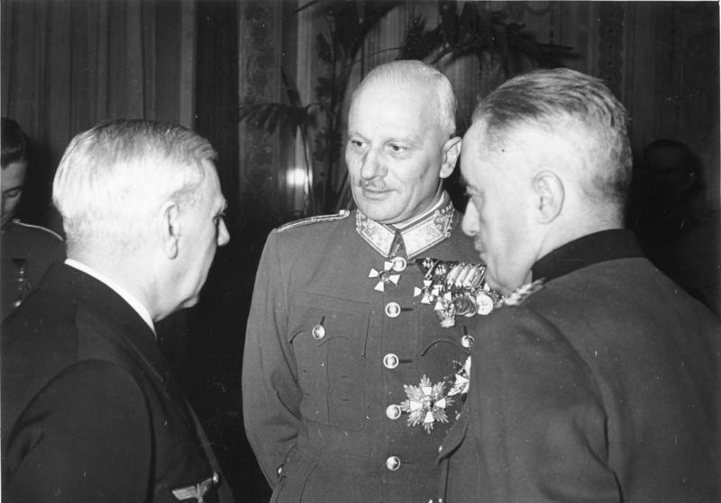 Scherl: Ungarns Wehrminister in Berlin Auf Einladung des Chefs des Oberkommandos der Wehrmacht, Generalfeldmarschall Keitel, traf heute der ungarische Honvedminister Vitez Bartha in Berlin ein. UBz: Exellenz Bartha im Gespräch mit Generalmajor von Glaise-Horstenau und Admiral Canaris, gelegentlich eines ihm zu Ehren im Hotel Adlon gegebenen Empfanges. Fot. 23.1.1941 868-41